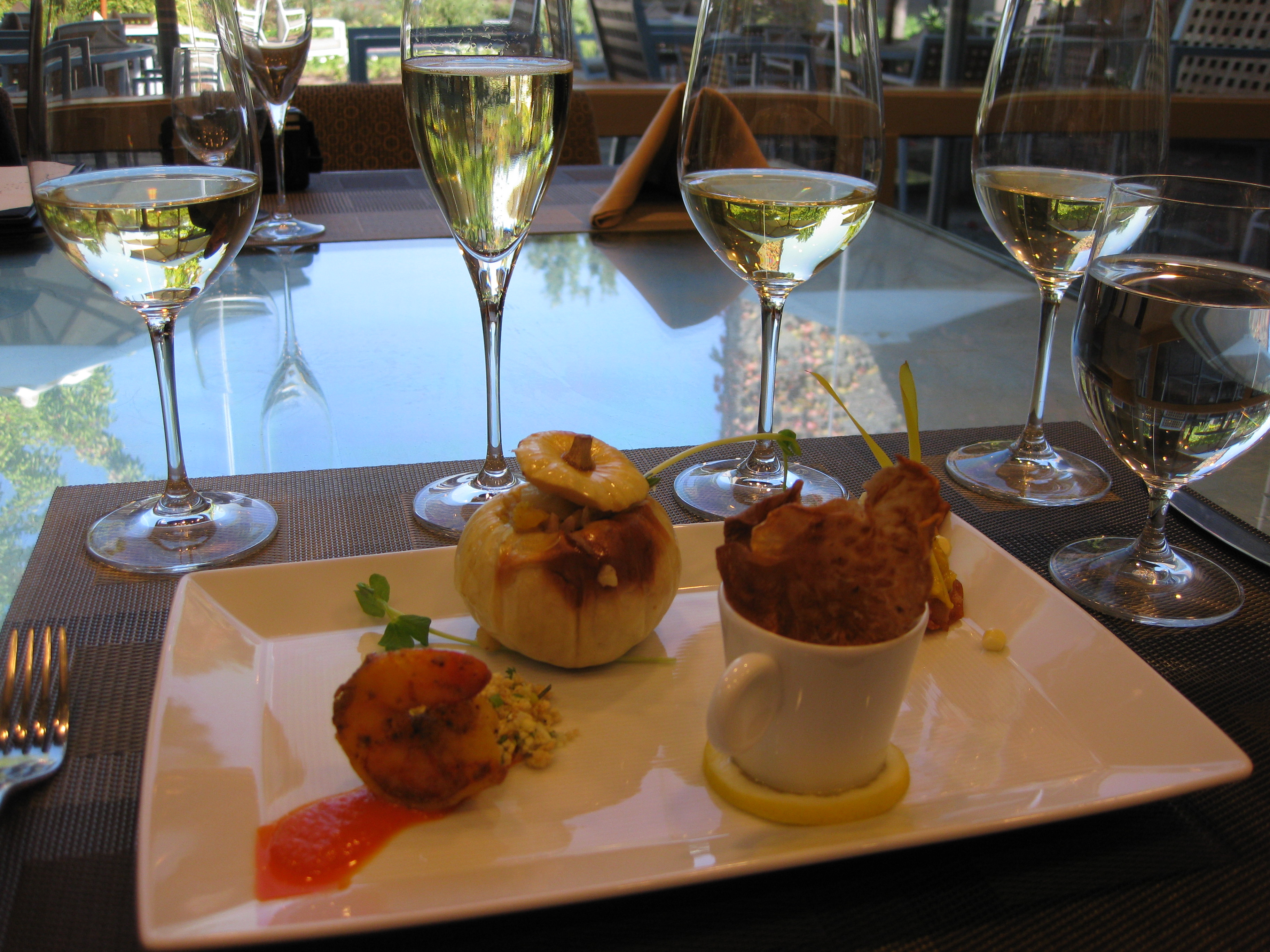 Dégustation automnale